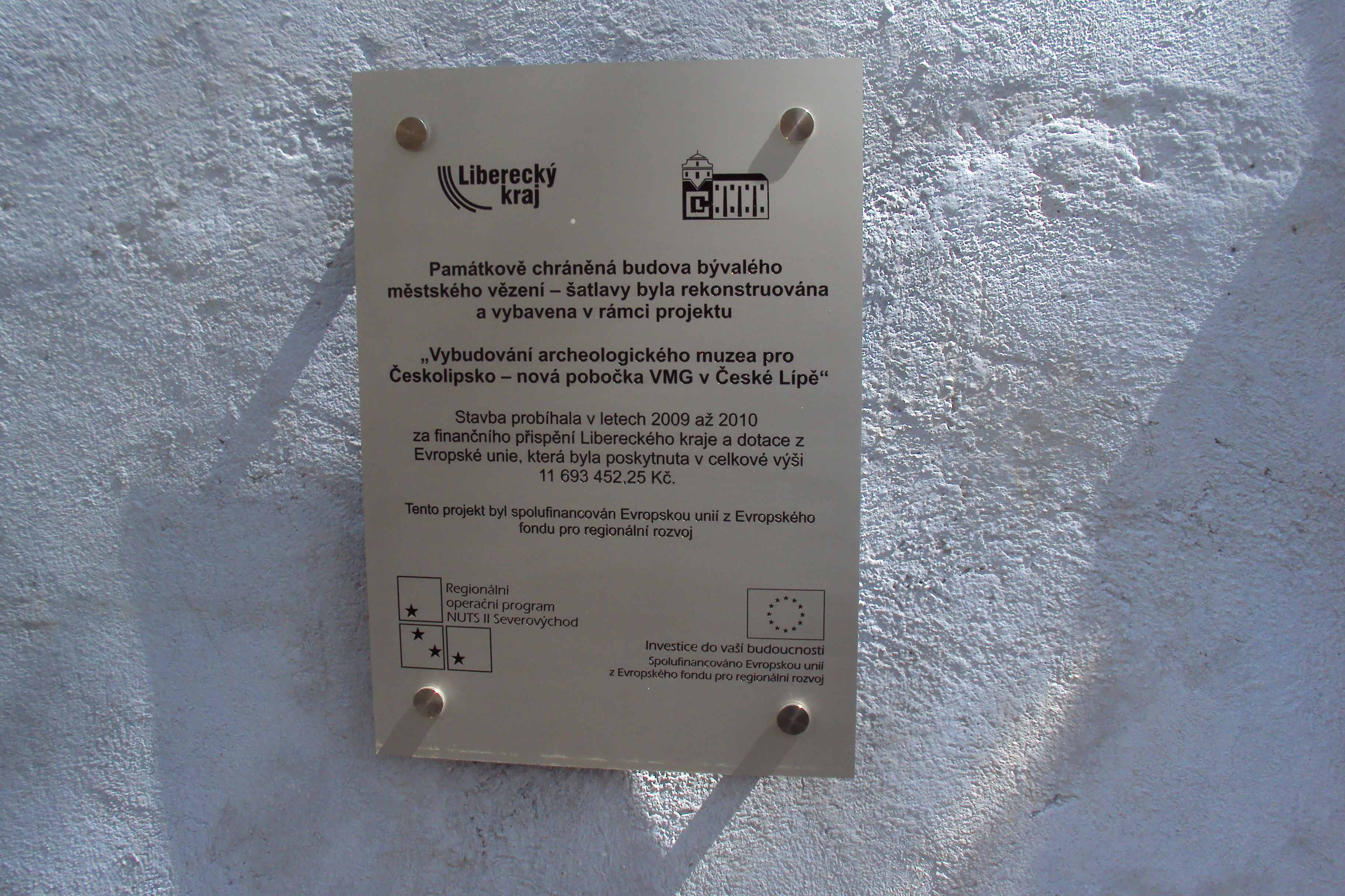 Šatlava je pobočka českolipského muzea ve Vězeňské ulici